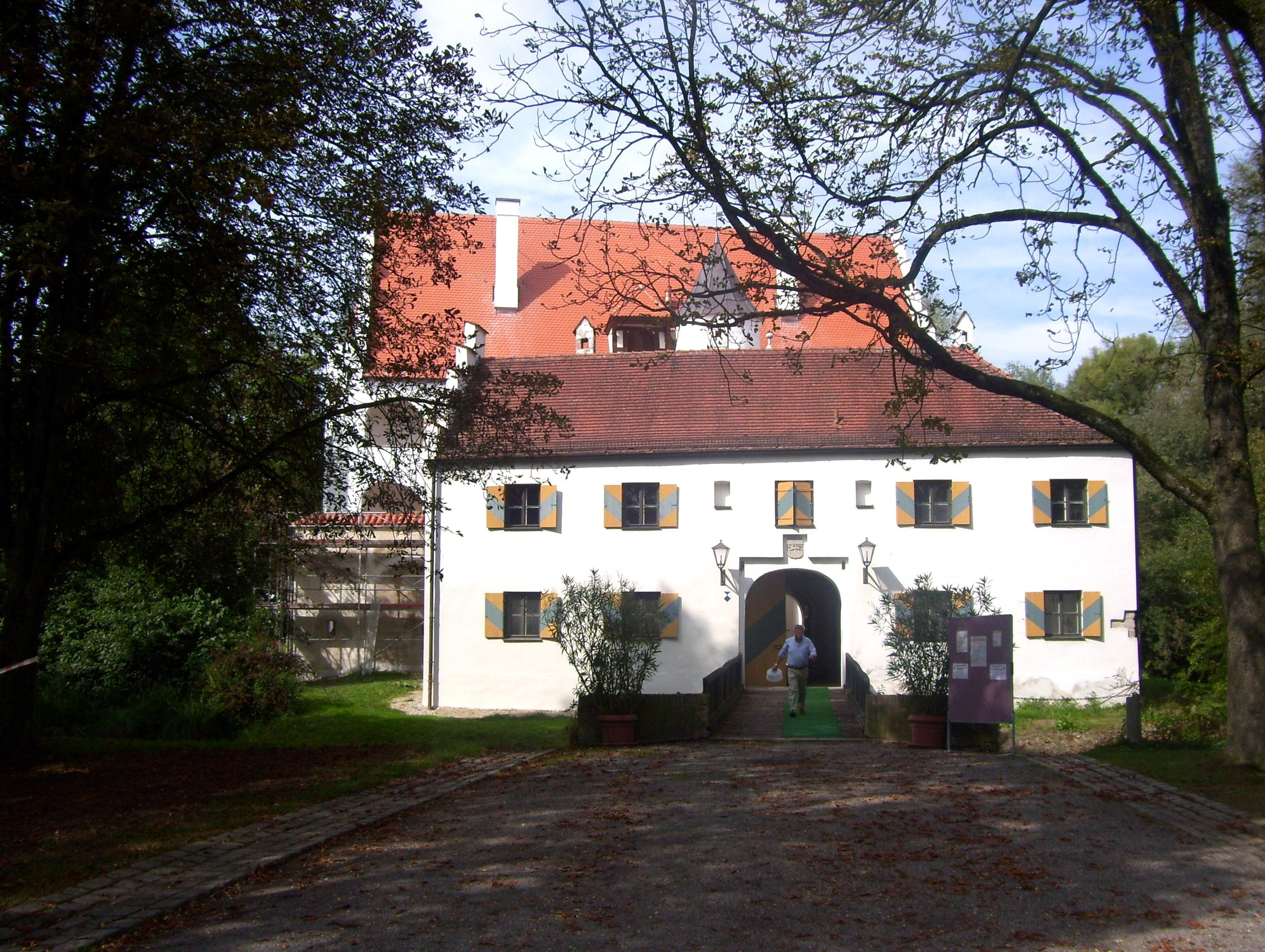 Schloss in Schambach (Gemeinde Straßkirchen)